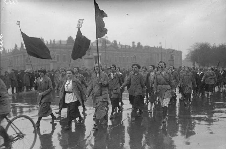 Demonstrationszug des kommunistischen Jugendverbandes in Berlin zum 1. Mai 1925